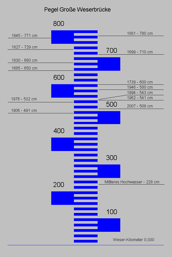 Pegel Bremen